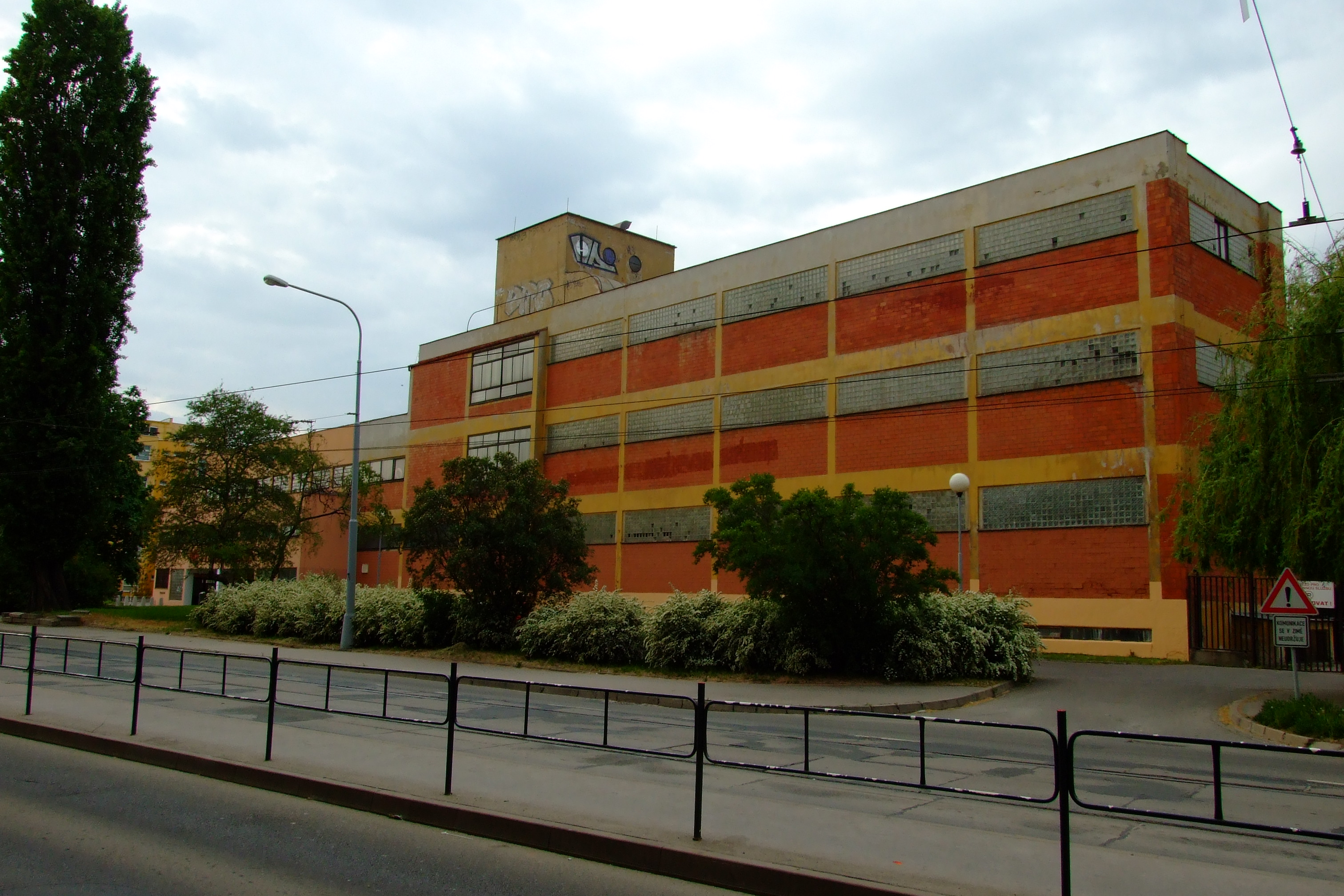 Lázně Zábrdovice